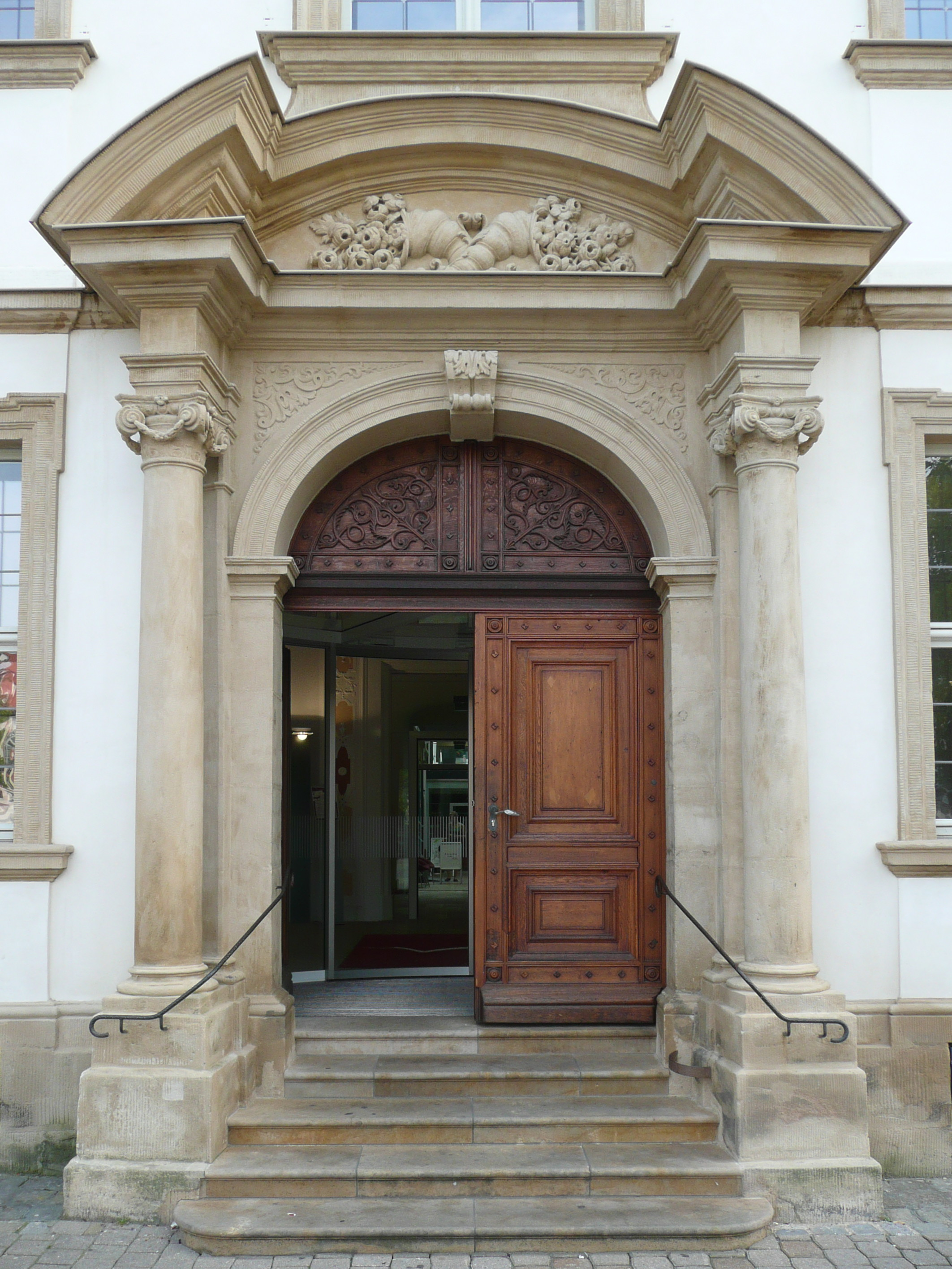 Erlangen, Marktplatz 1, Palais Stutterheim, erbaut 1728/30, zwischen 1836 und 1973 Rathaus, heute Stadtbibliothek und Städtische Galerie, D-5-62-000-427